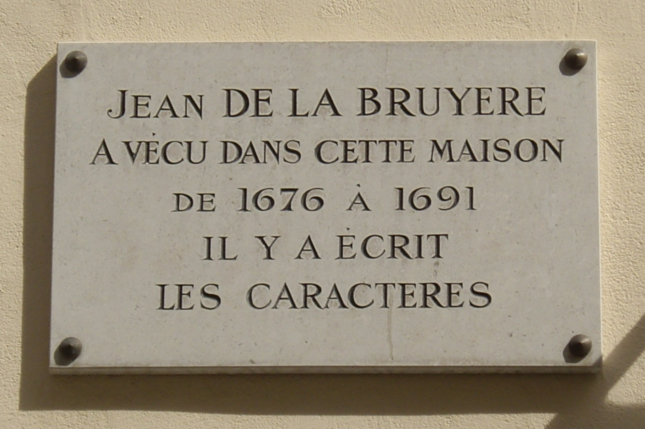 Plaque apposée au n° 25 de la rue des Grands-Augustins, Paris 6e, où vécut le moraliste Jean de La Bruyère (1645-1696) de 1676 à 1691 et où il écrivit les Caractères.